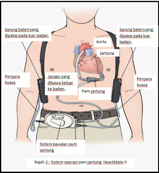 Komponen Pam jantung HeartMate II ventrikel kiri yang membantu sistem peranti.